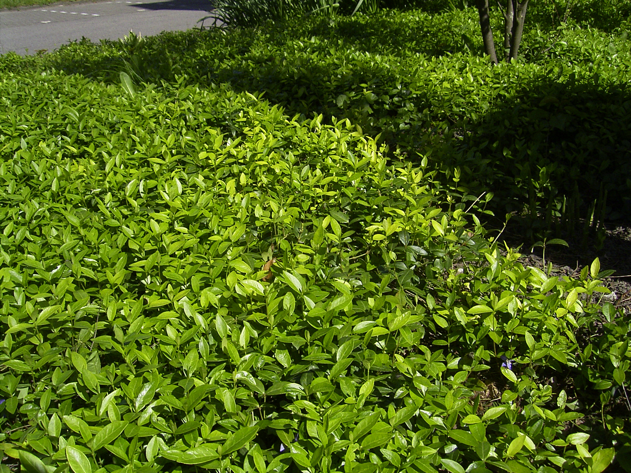 Vinca minor plant, Zoetermeer.